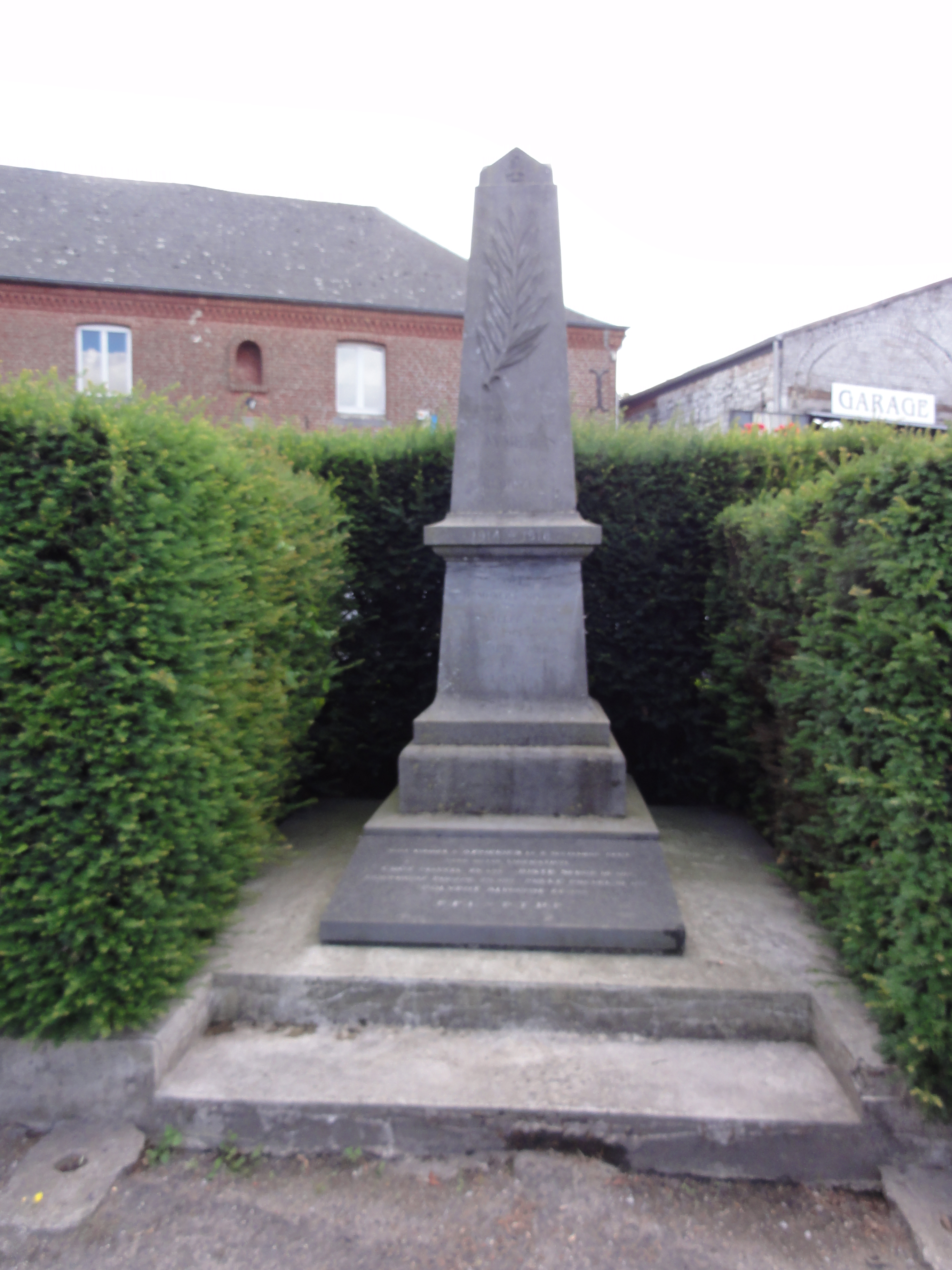 Aimeries (Aulnoye-Aimeries, Nord, Fr) monument aux morts